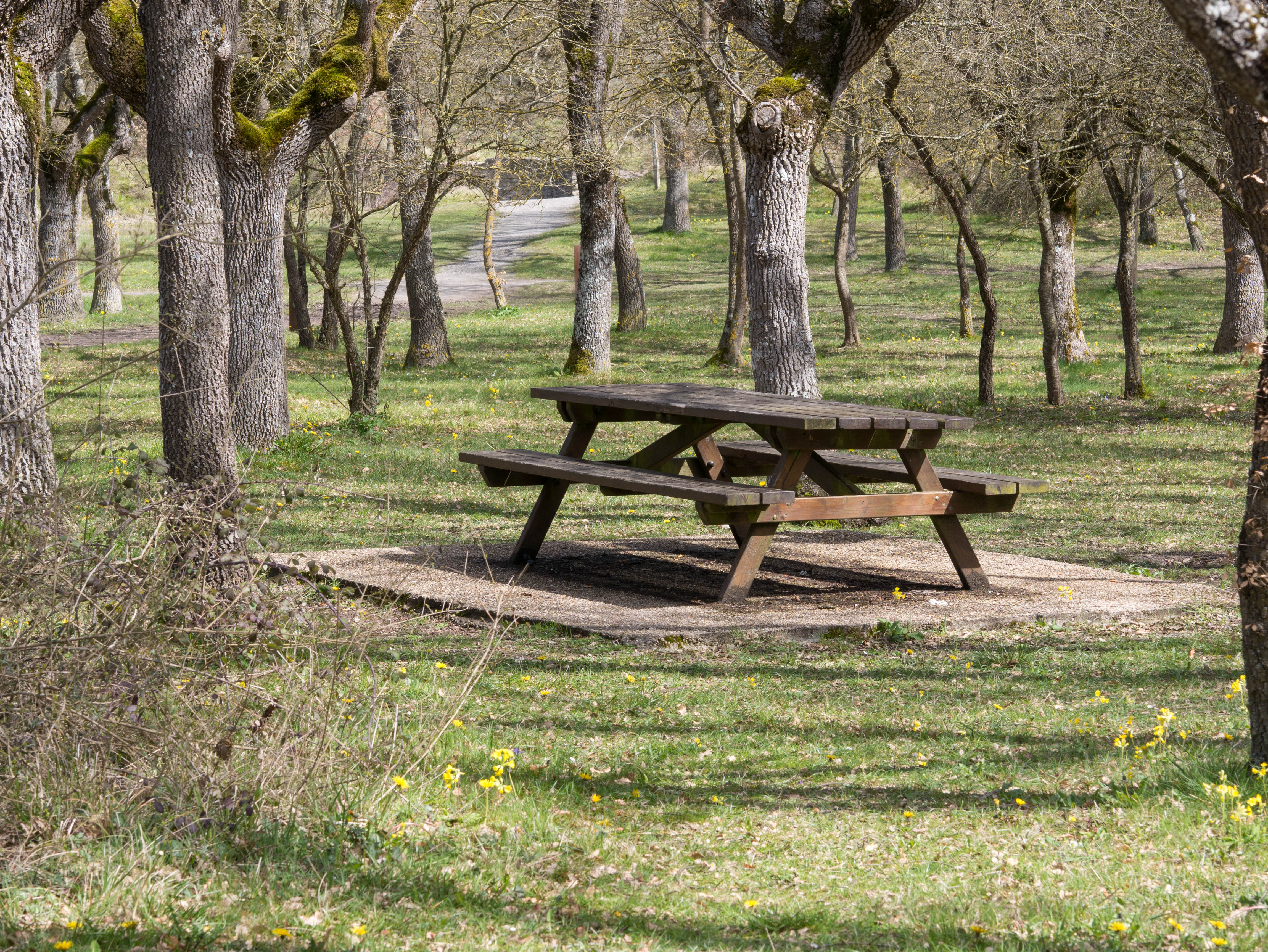 Merendero en el Bosque de Armentia, Vitoria-Gasteiz, Álava, País Vasco, España